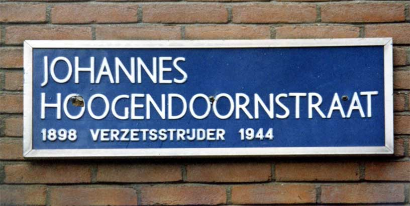 Straatnaambord Johannes Hoogendoornstraat te Haarlem